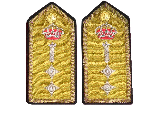 Hombreras de Ministro Togado de la Armada